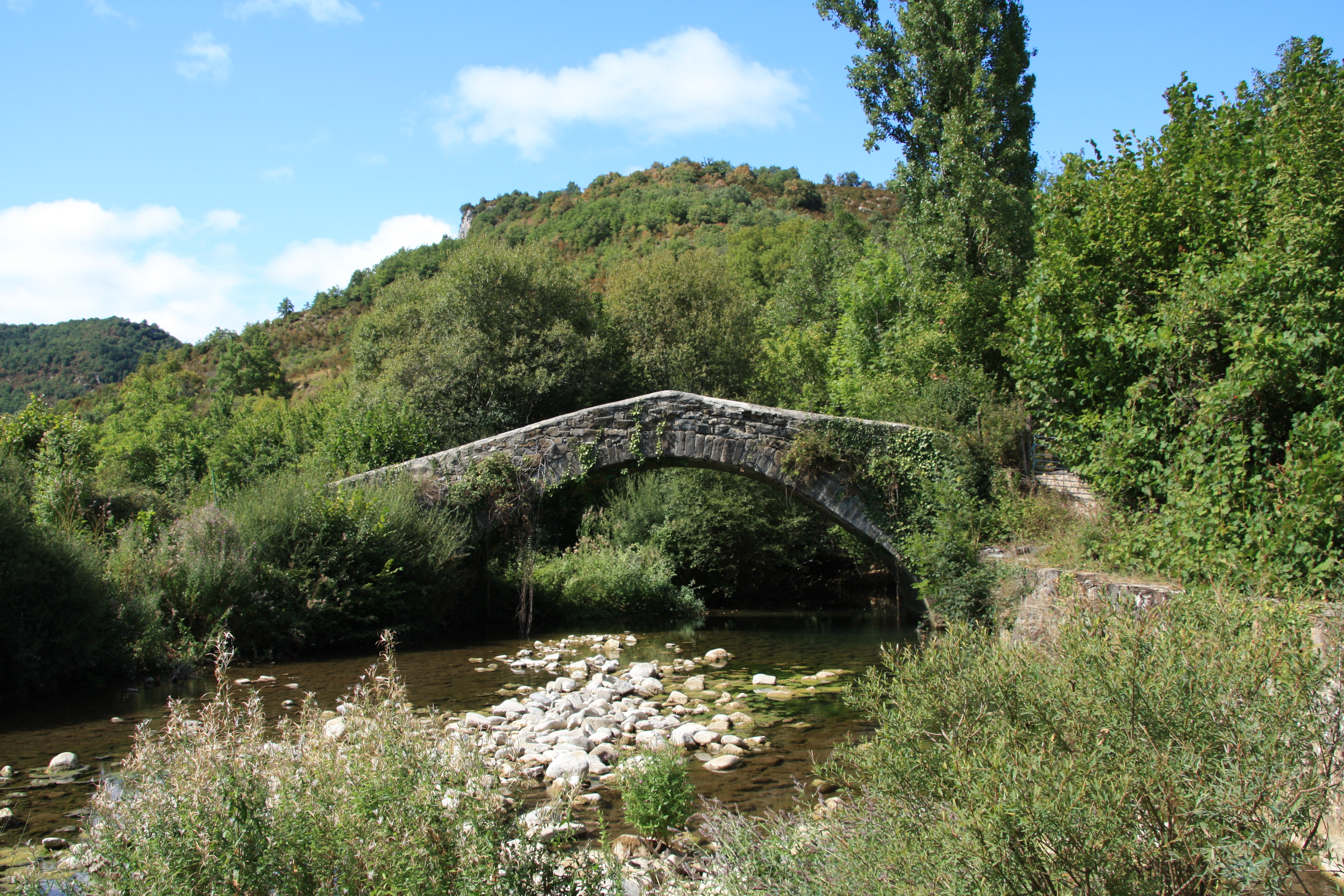 Herrigunetik Santa Luzia baselizara dijoan zubia.